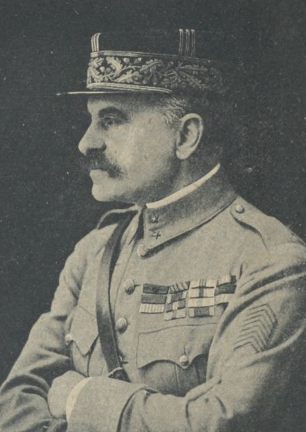 GÉNÉRAL GOYBET, COMMANDANT LE 30e BATAILLON A LA MOBILISATION